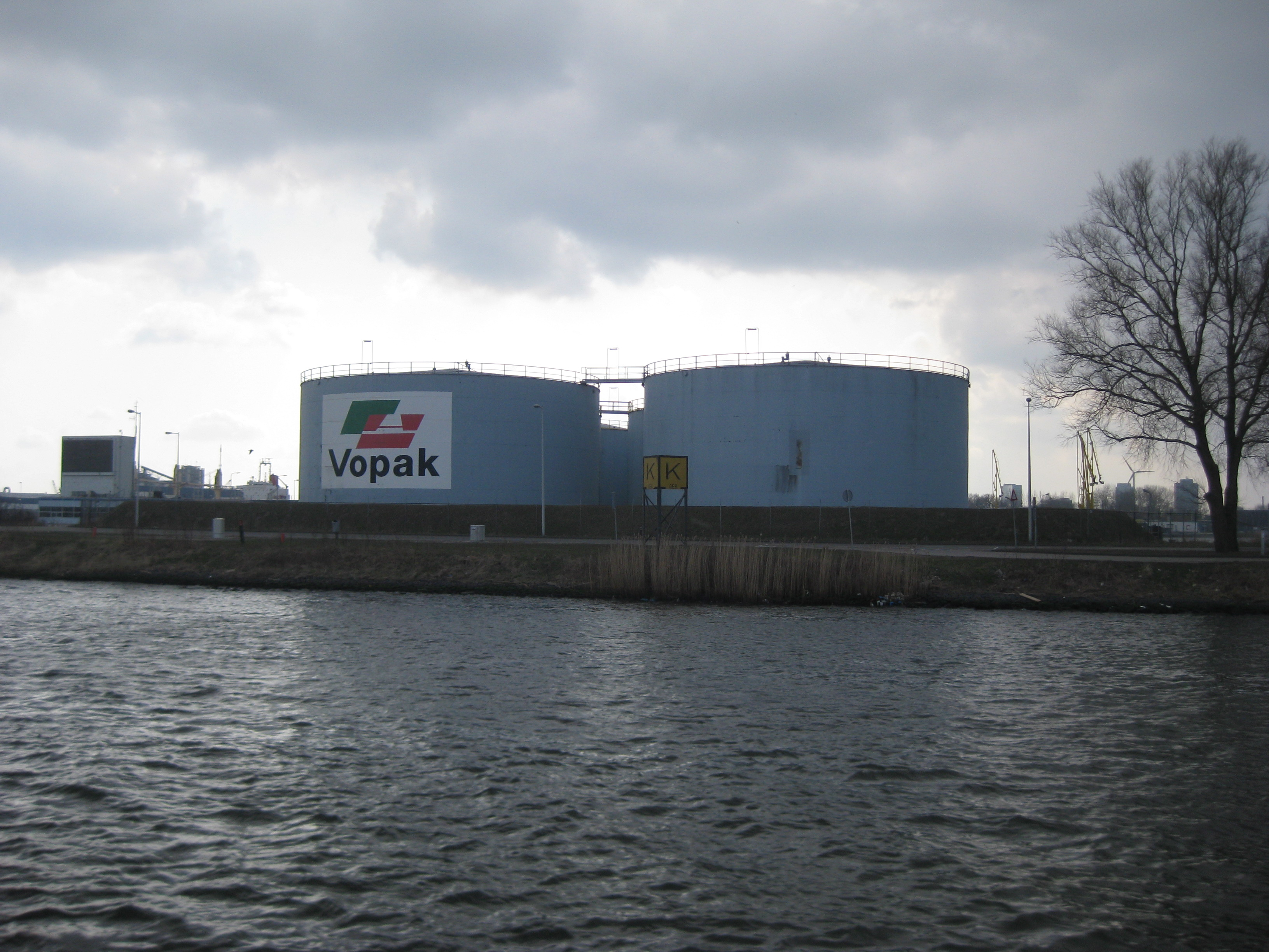 Vopak, bedrijf in de Amsterdamse Haven